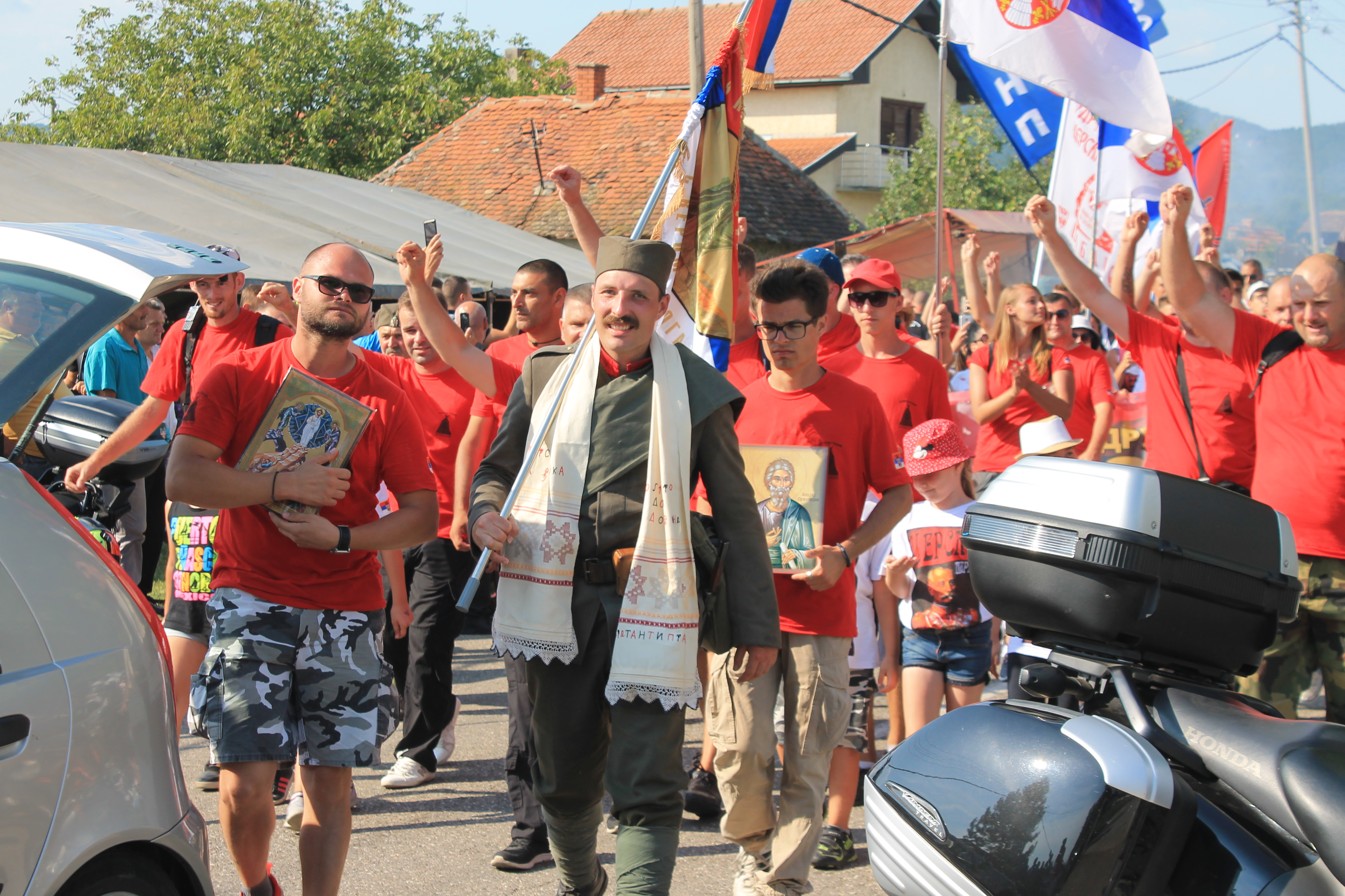 Cerski marš 2018